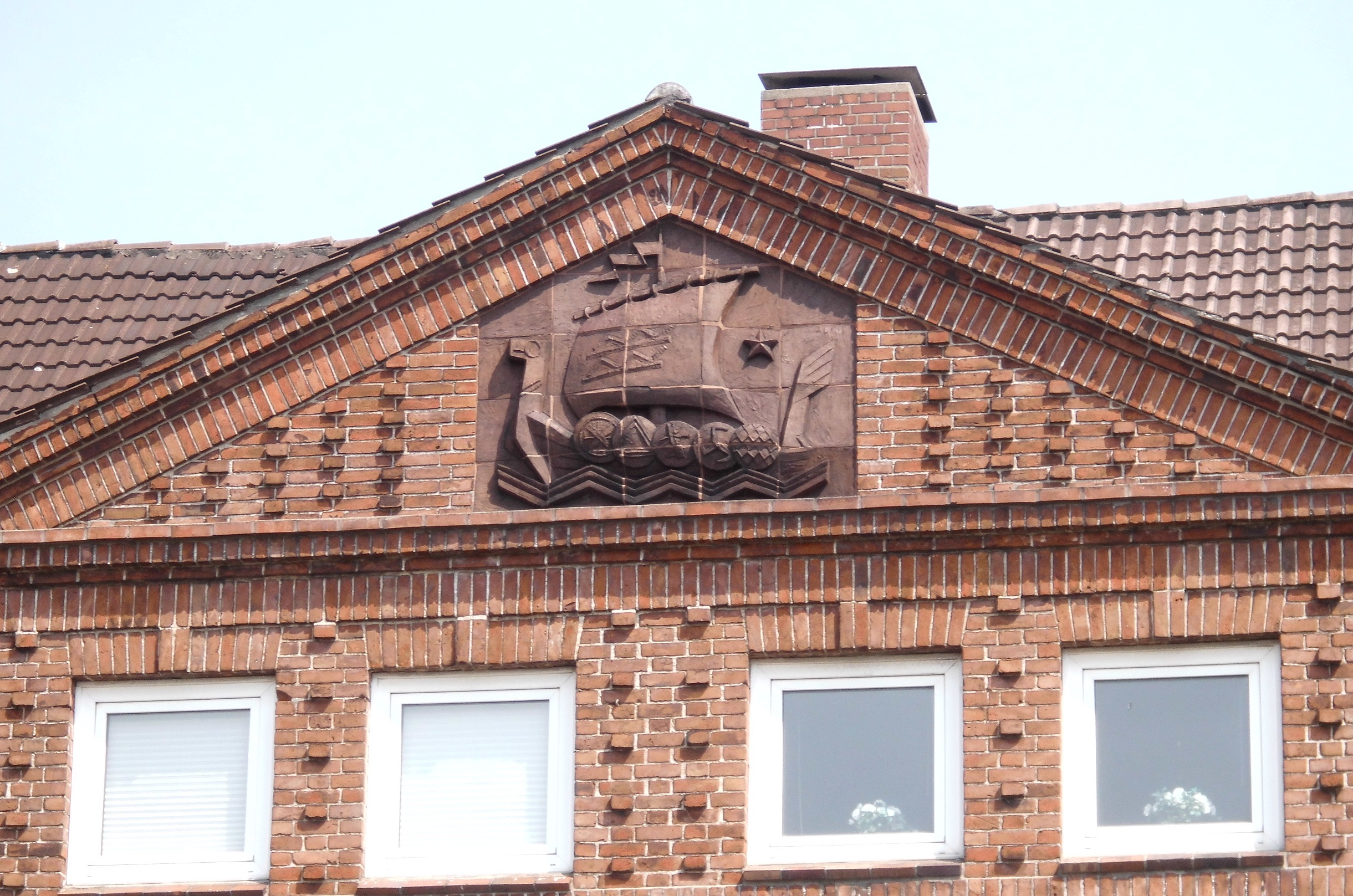 Detail in der Hausfassade Hansastraße 103 im Kieler Stadtteil Ravensberg. Siehe auch Gesamtaufnahme.